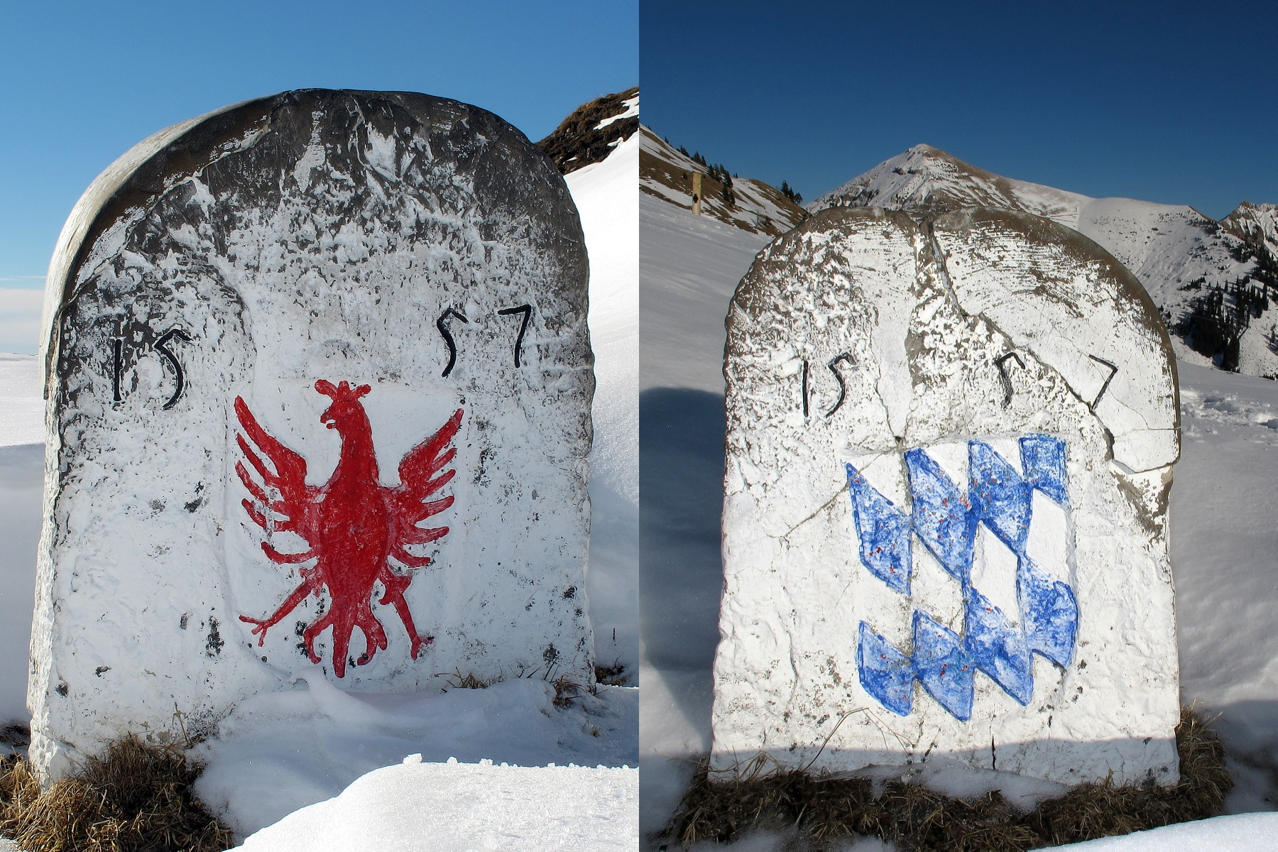 Grenzstein Nr. 209 / Landesgrenze Bayern-Tirol